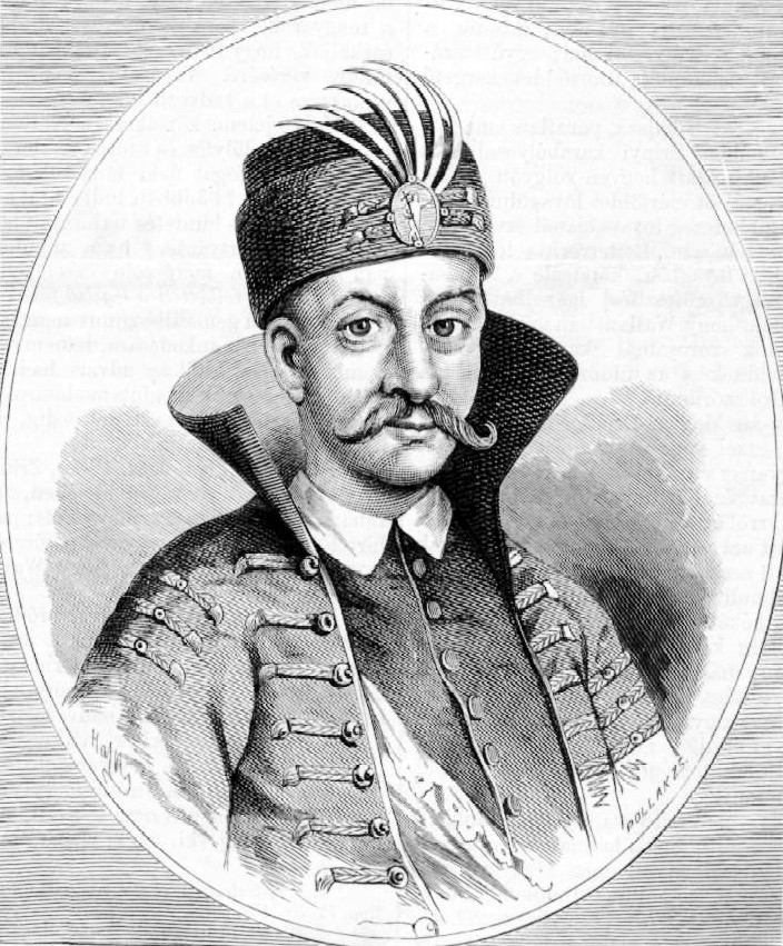 Zrínyi György (1599–1626) hadvezér, horvát bán, Zrínyi Miklós (1620–1664) és Zrínyi Péter (1621–1671) apja. Pollák Zsigmond metszete. Pollák Zsigmond metszete korabeli ábrázolás alapján